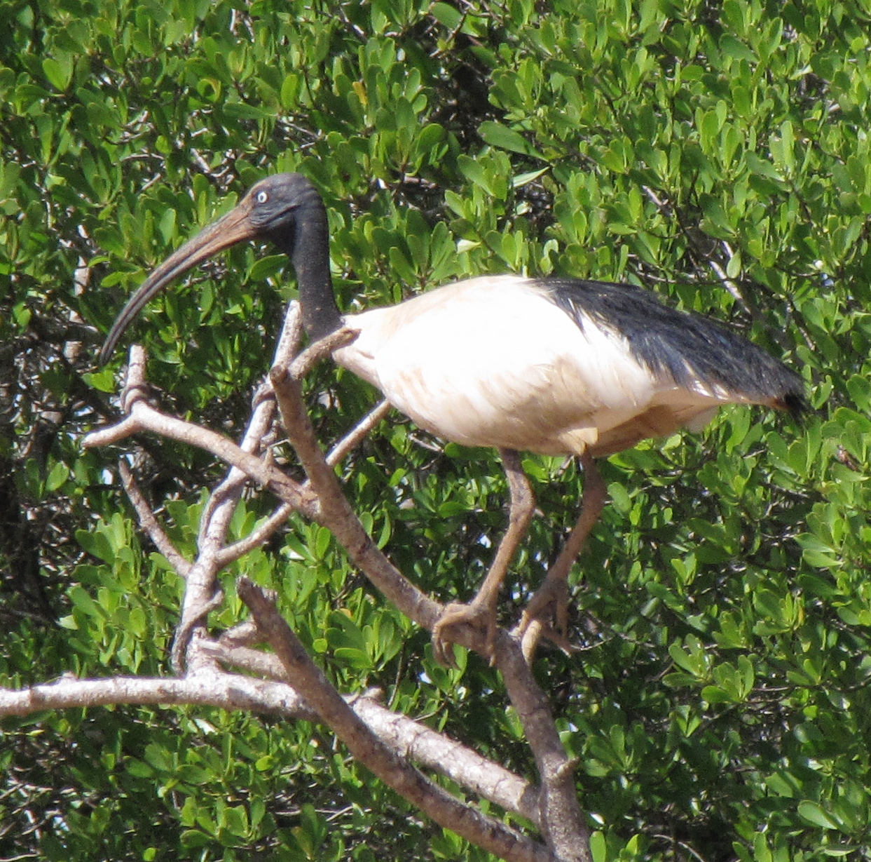 Threskiornis bernieri au complexe Mahavavy Kinkony, Madagascar